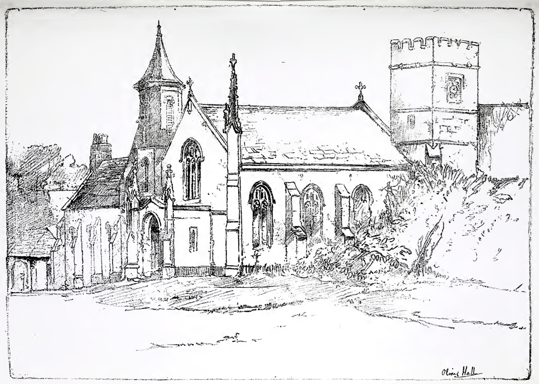 Grace Dieu Manor chapel, c.1898